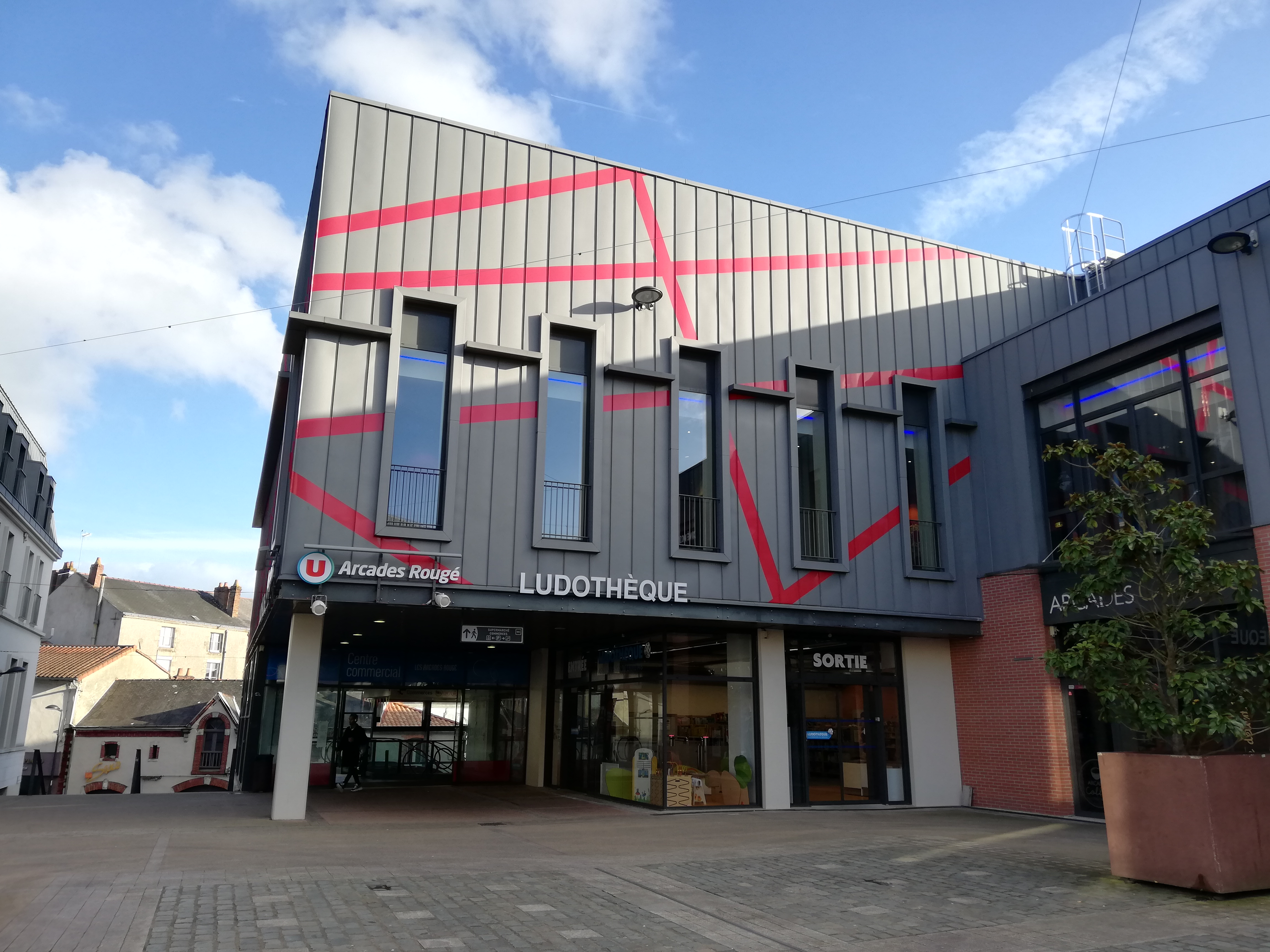 Super U cholet